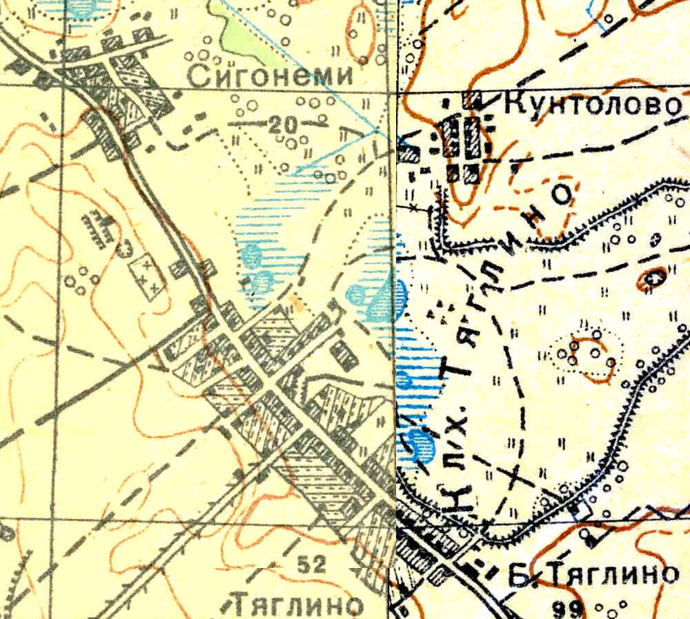 Топографическая карта Ленинградской области, квадрат О-36-13-А-в (Красногвардейск), деревня Тяглино